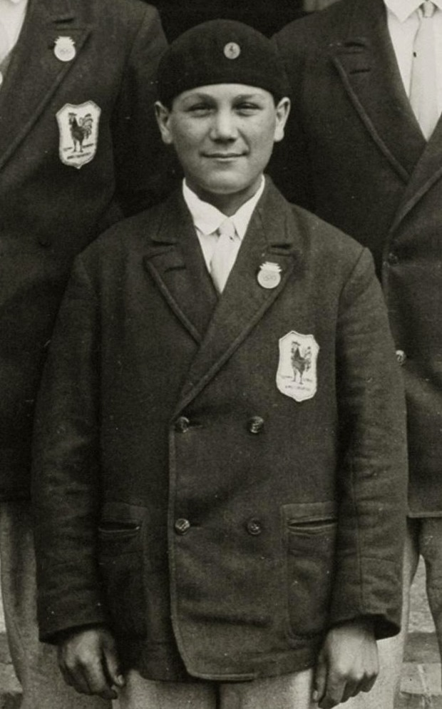 Olympische Spelen Amsterdam, Nederland, 1928: Roeien, twee met stuurman. Het Franse team poseert: A. Marcelle, E. Marcelle en H. Préaux